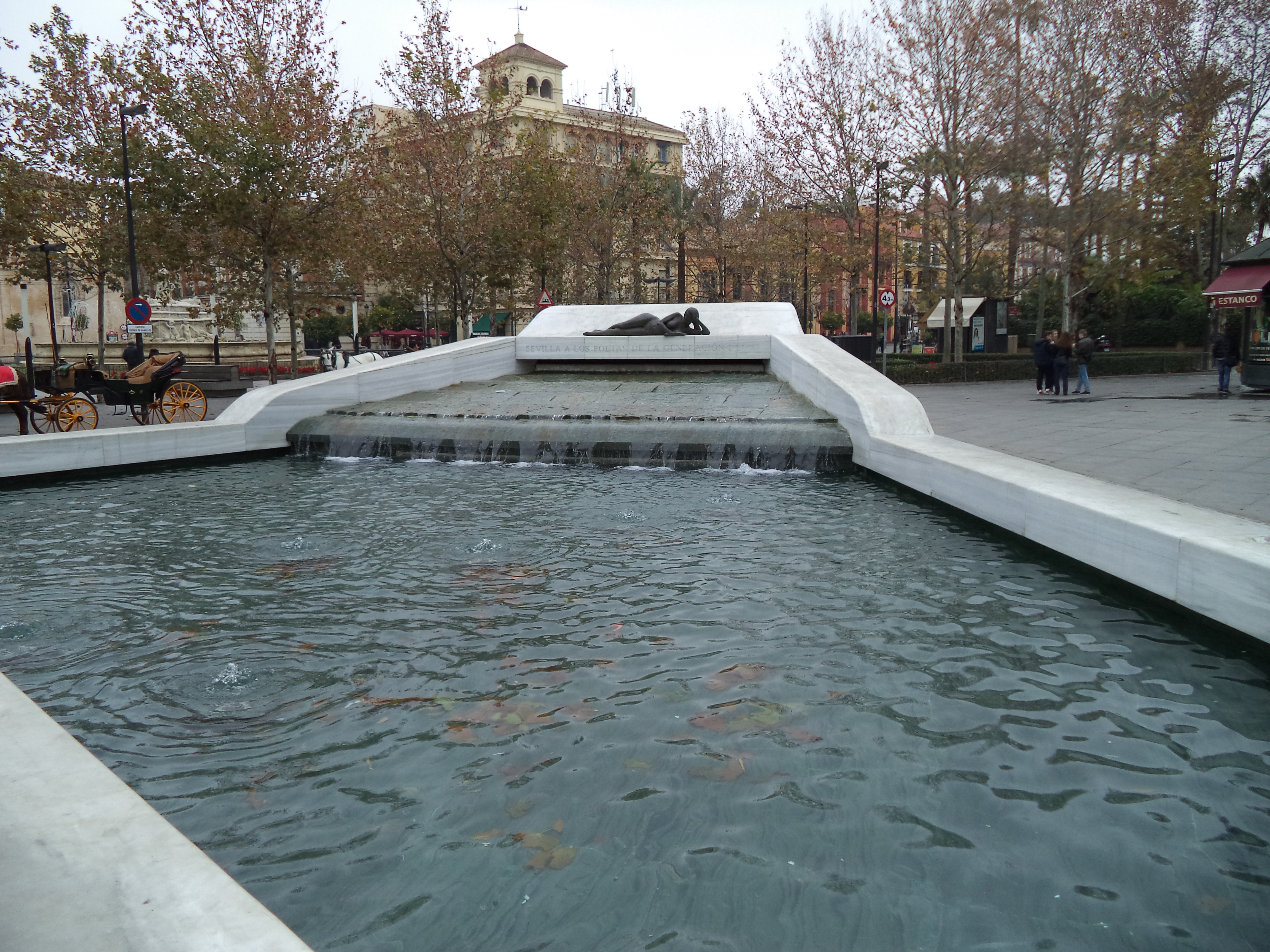 Fuente en Sevilla a los poetas de la Generación del 27. Fue realizado por Antonio Barrionuevo Ferrer en 2011, con escultura de César Portela, y está cubierta de mármol Macael